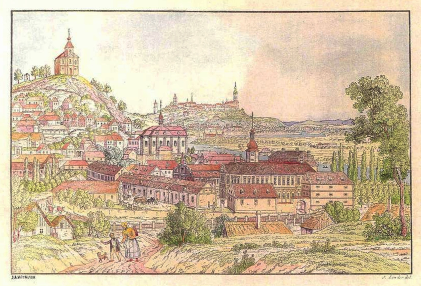 Veduta Liběchova od Josefa Lindera (1825-1855). Koloroval J. A. Votruba. Mědirytina.